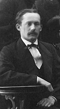 Виктор Юльевич Рихтер (1841-1891), русский химик